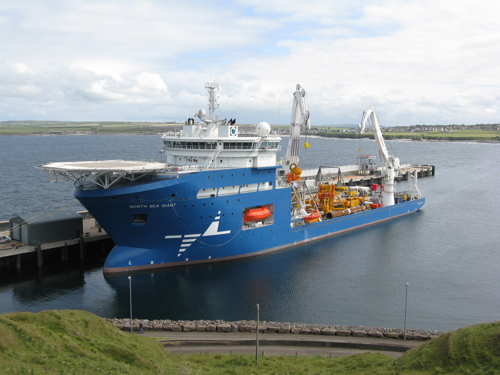 North Sea Giant